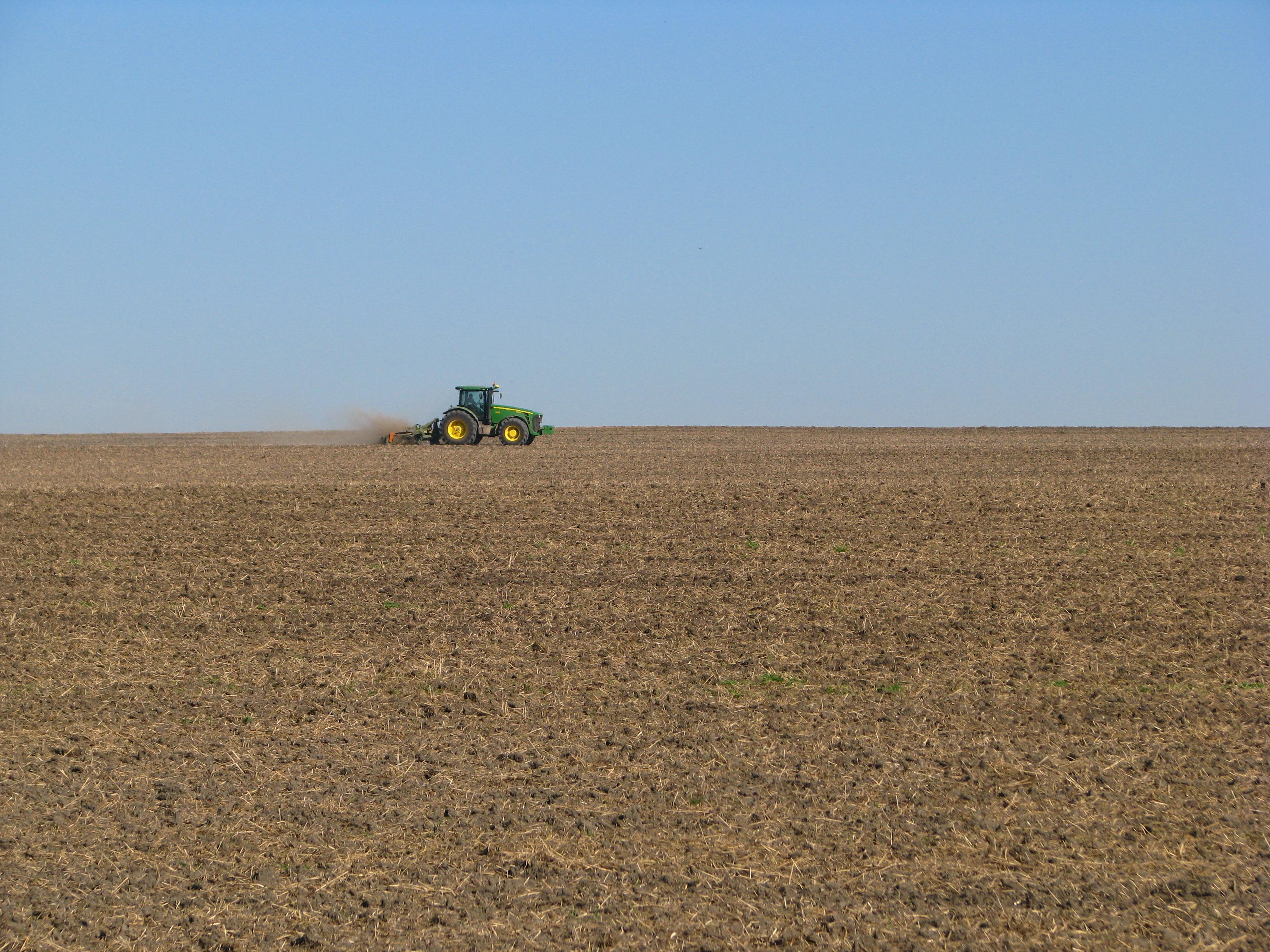 Weite Ackerflur bei Herrschwende im Thüringer Becken (Thüringen, Deutschland); John-Deere-Traktor bei der Bodenbearbeitung